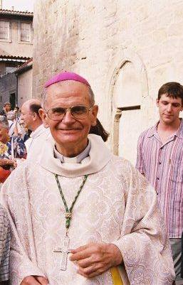 Mgr Jacques Despierre, après une messe à Carcassone.